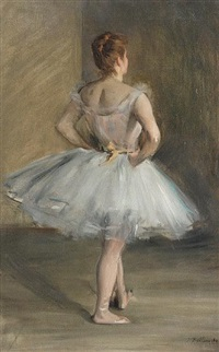 Albert de Belleroche, La Danseuse (modèle: Lili Grenier), années 1890. 69 x 43 cm, coll. part.